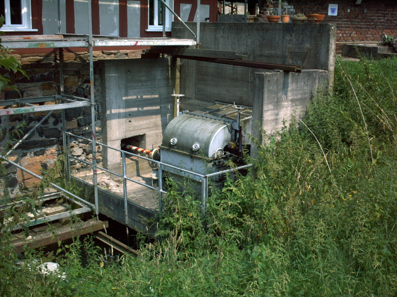 Blick auf die Ossberger Turbine der Neumühle (Lißberg)